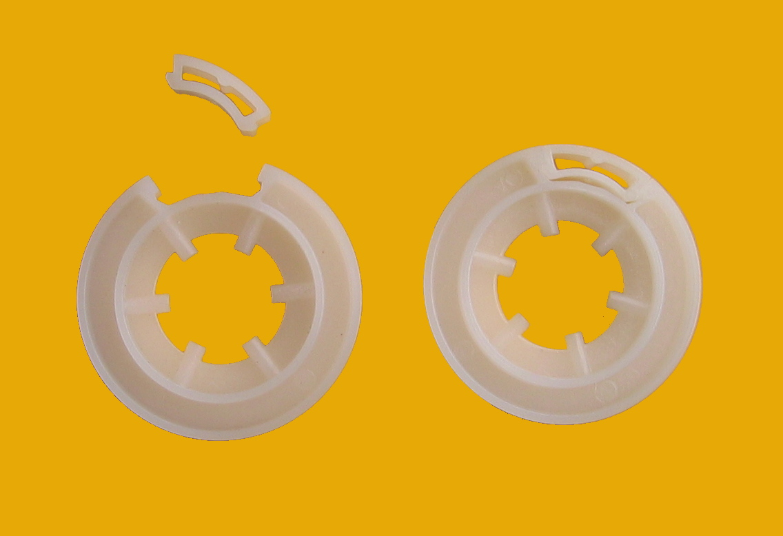 Teile einer Compact Cassette